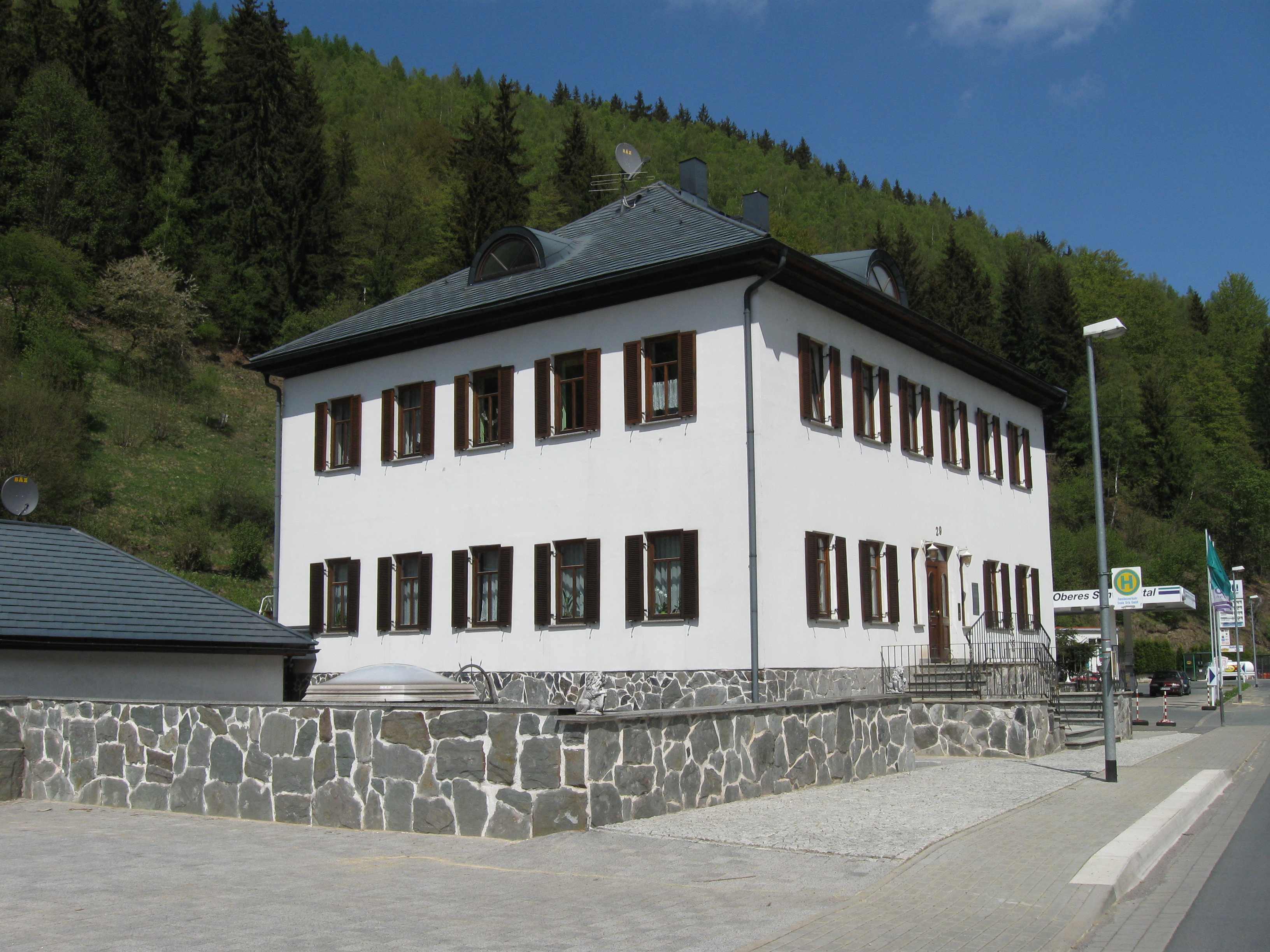 In dieser Villa wohnte die Familie von Carl Wilhelm Voigt, Eigentümer der Bleiweiß- und Farbenfabrik bis zu ihrer Enteignung nach dem 2. Weltkrieg. Danach gehörte sie zum VEB Farbenfabrik Katzhütte. Nach der Wende ist die Villa von den jetzigen Eigentümern saniert und sorgfältig restauriert worden. Eine Arztpraxis wurde eingerichtet.